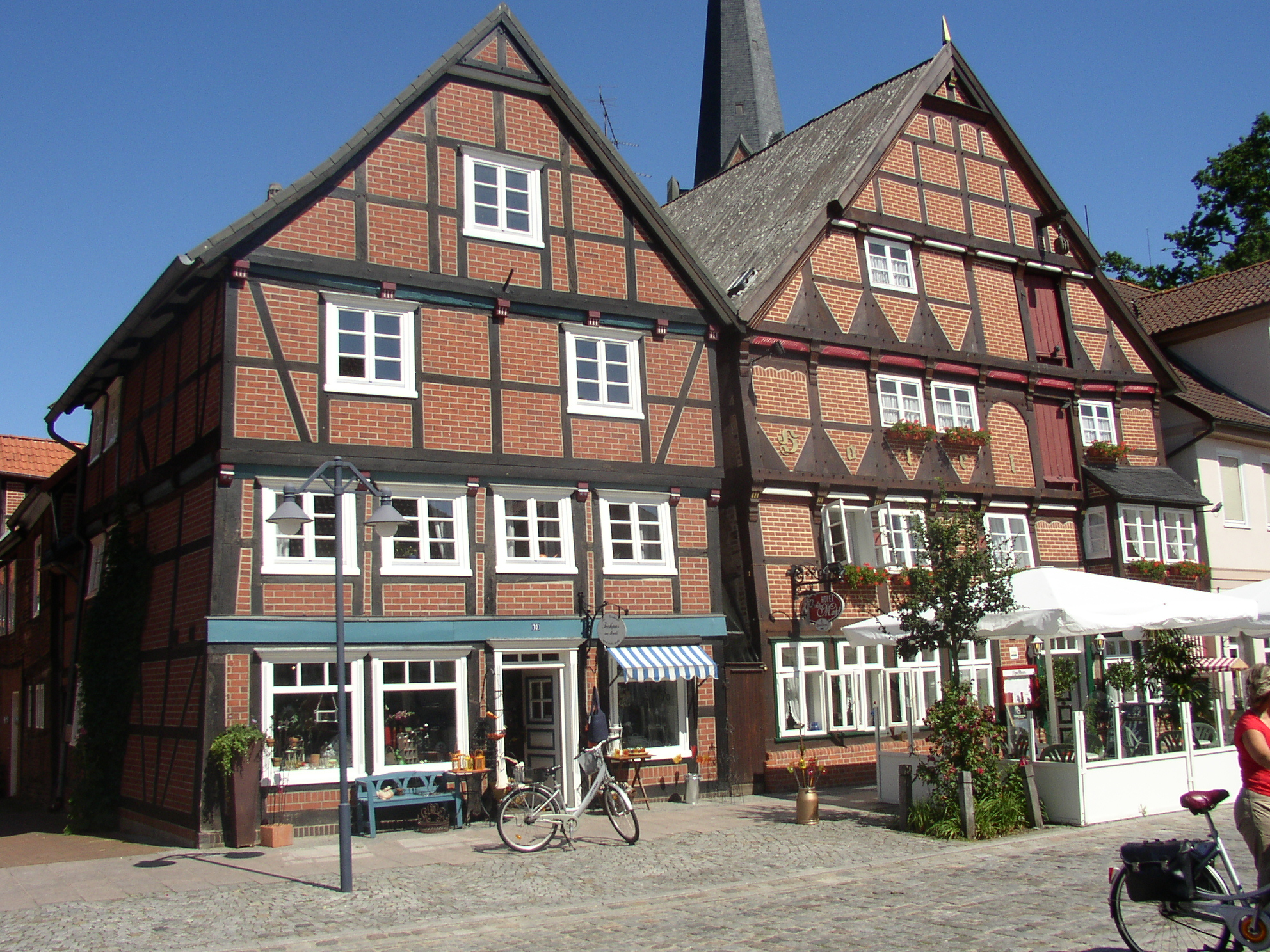 Dannenberg - Haus von 1608